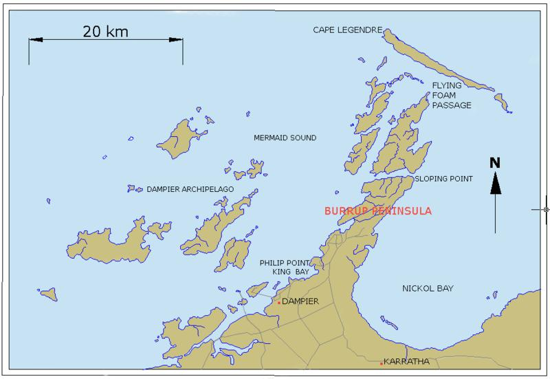 carte de l'archipel Dampier